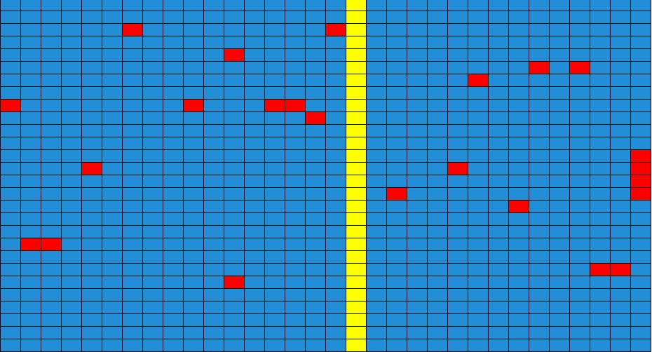 Beispiel CIRC Teil 2